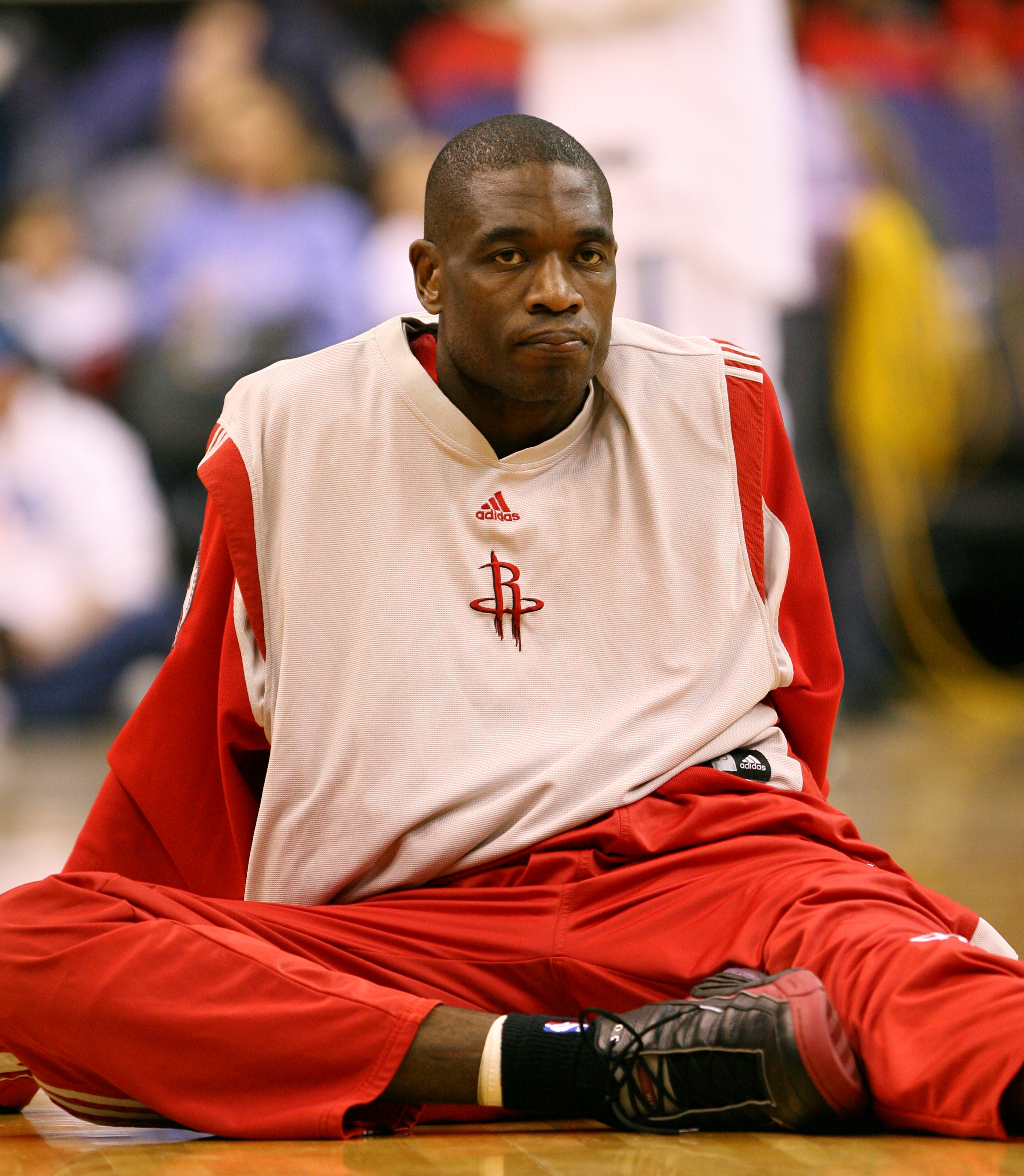 120906l 035